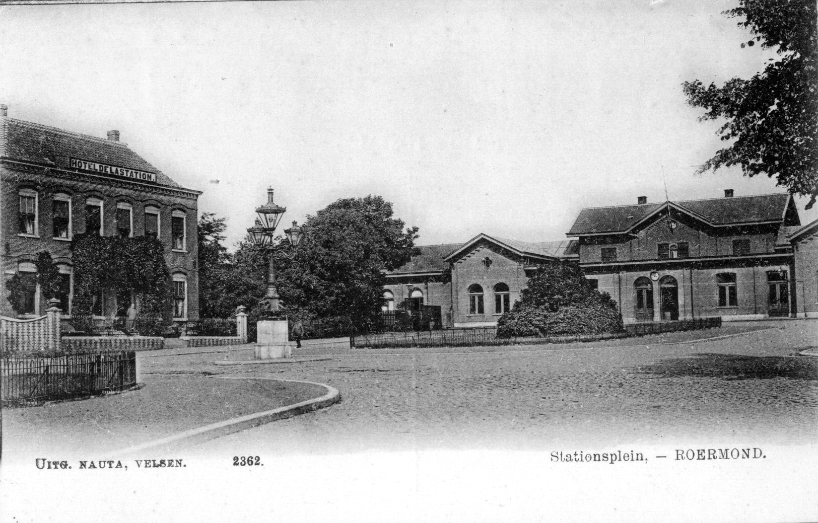 Stationsplein te Roermond, met links het Hotel de la Station en rechts het station Roermond; circa 1900. Collectie van het Utrechts Archief.